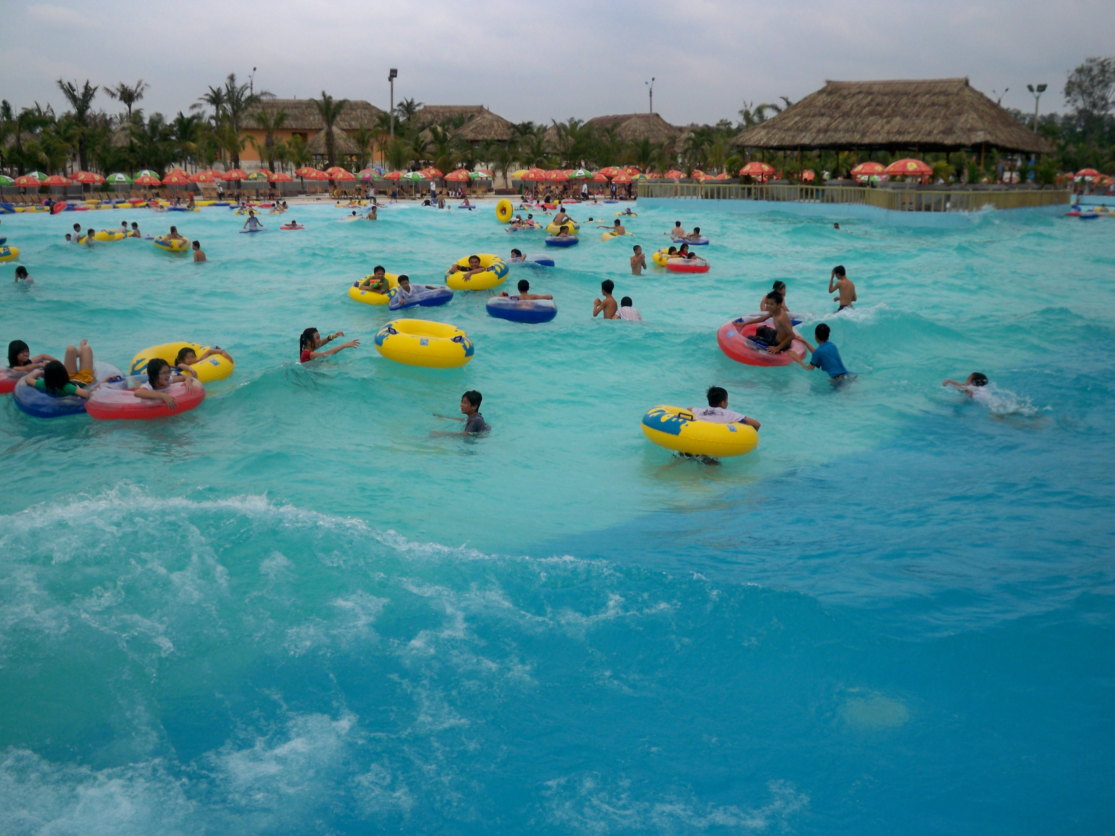 Lạc Cảnh Đại Nam Văn Hiến